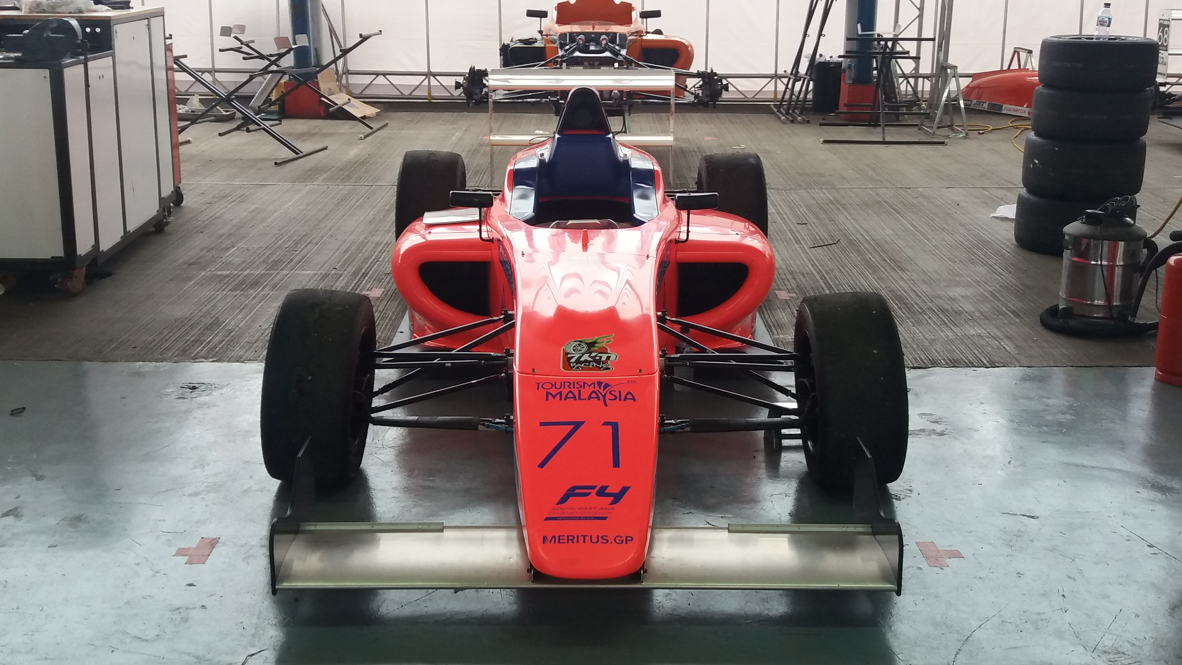 Mobil Kezia Santoso di garasi Sirkuit Sentul, 2016